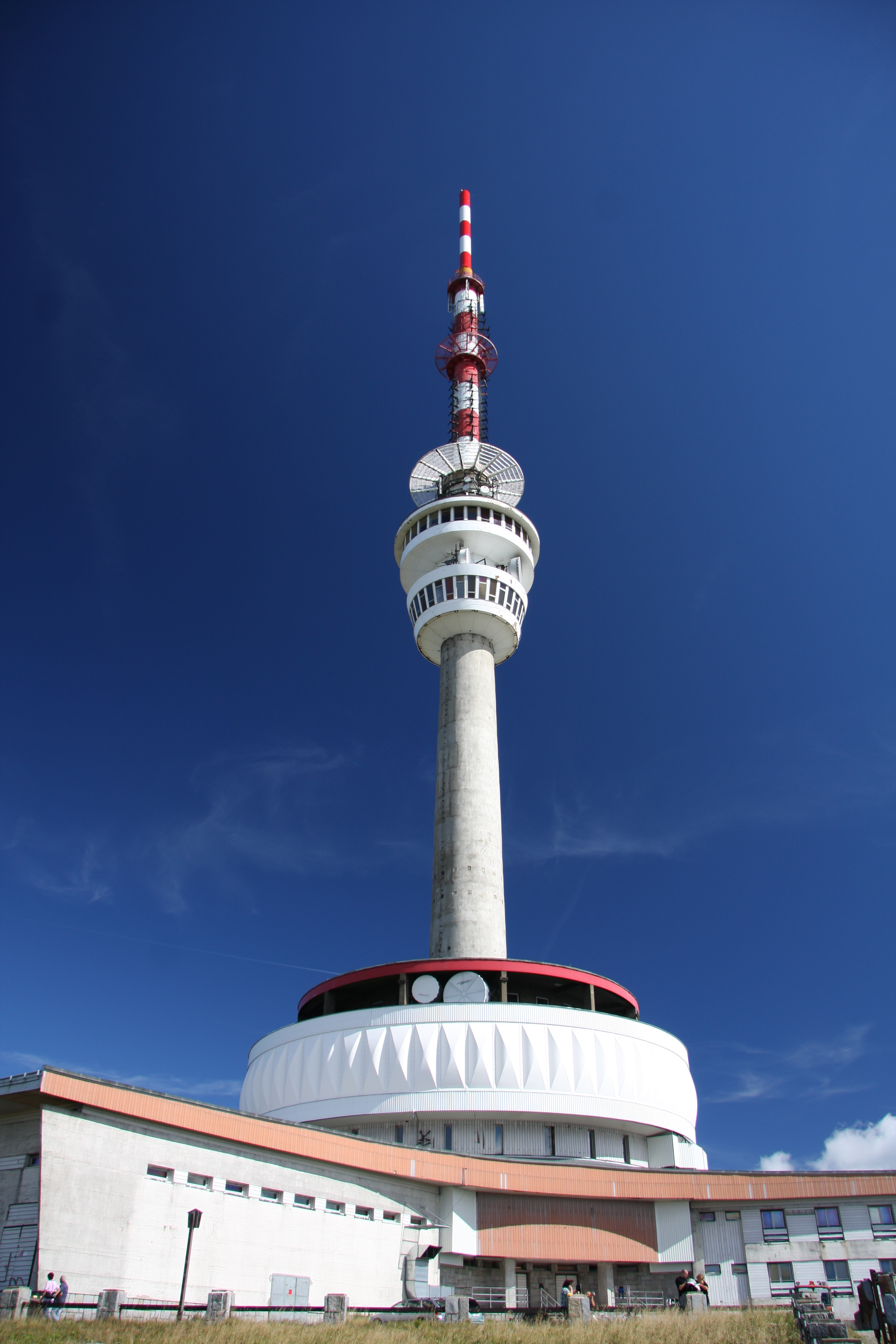 televizní vysílač Praděd